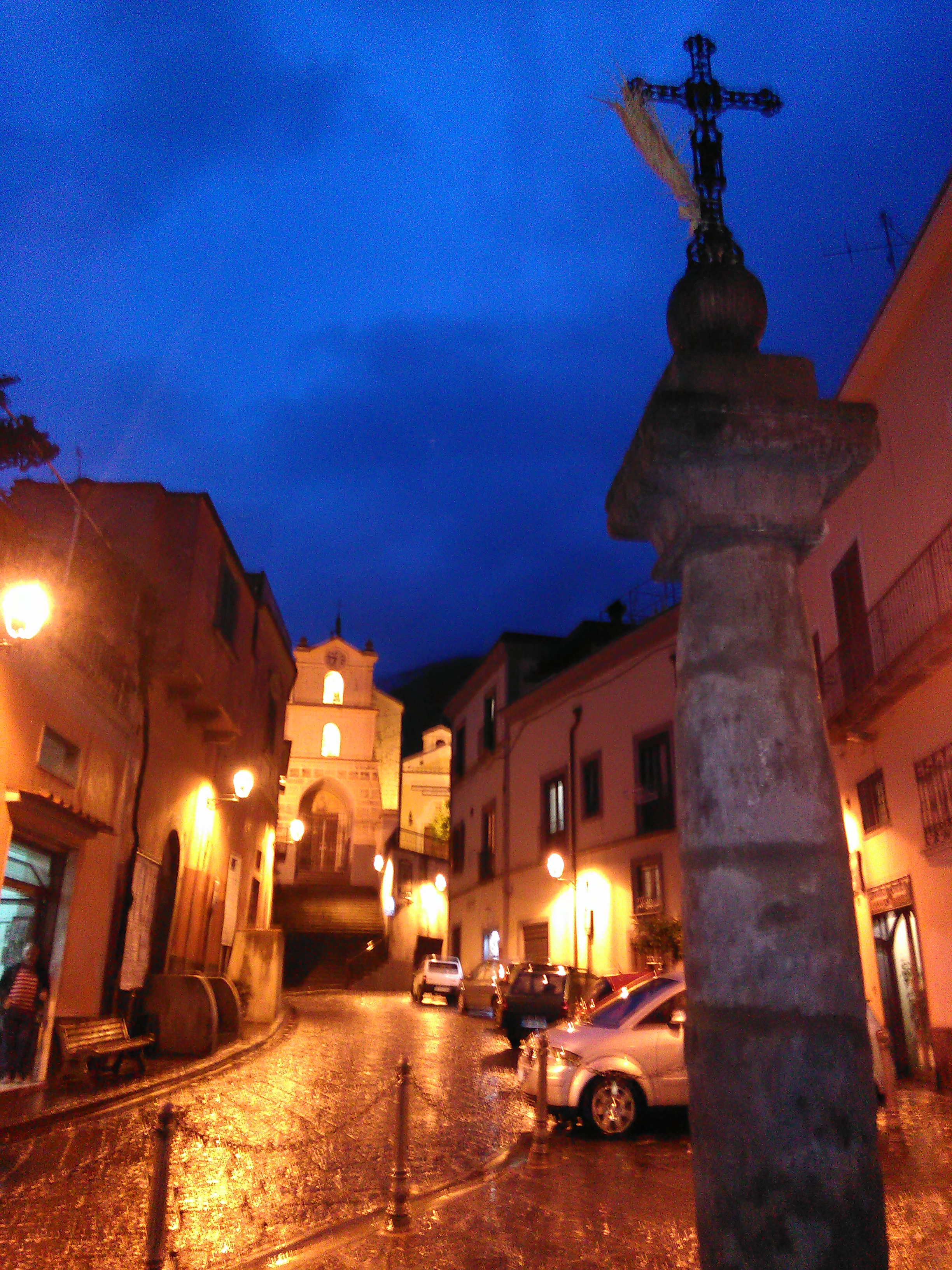 Piazza San Giovanni Battista di notte|=opera propria|10-10-2015|Fermi24